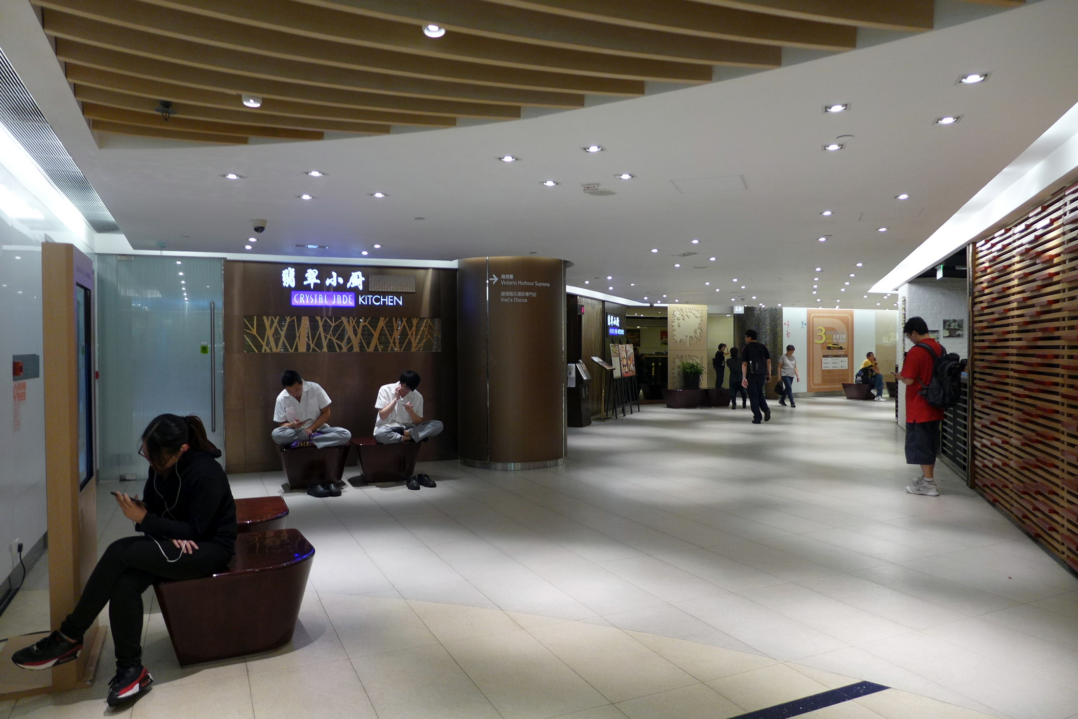 Kornhill Plaza Level 4 Restaurant